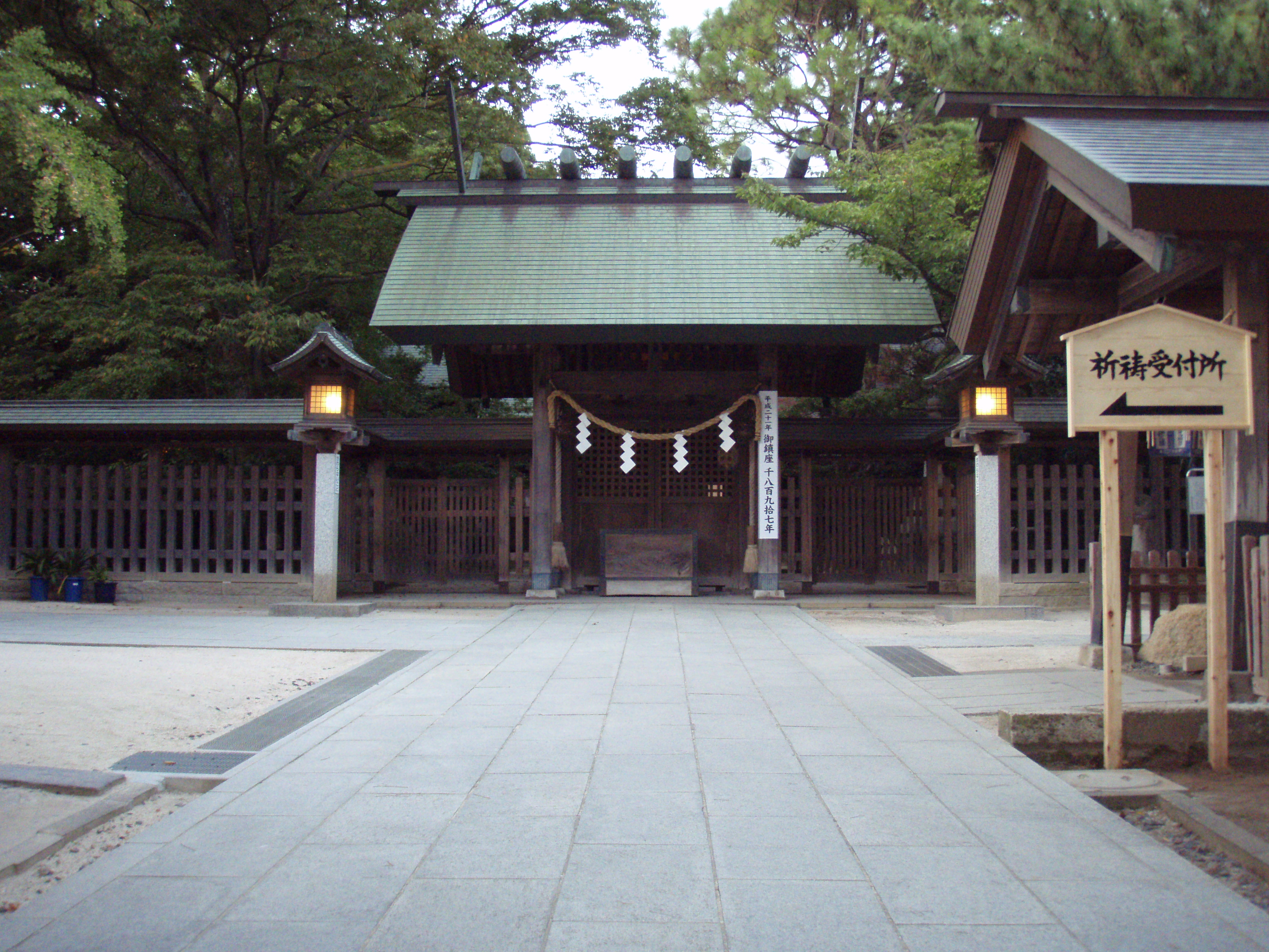 船橋大神宮